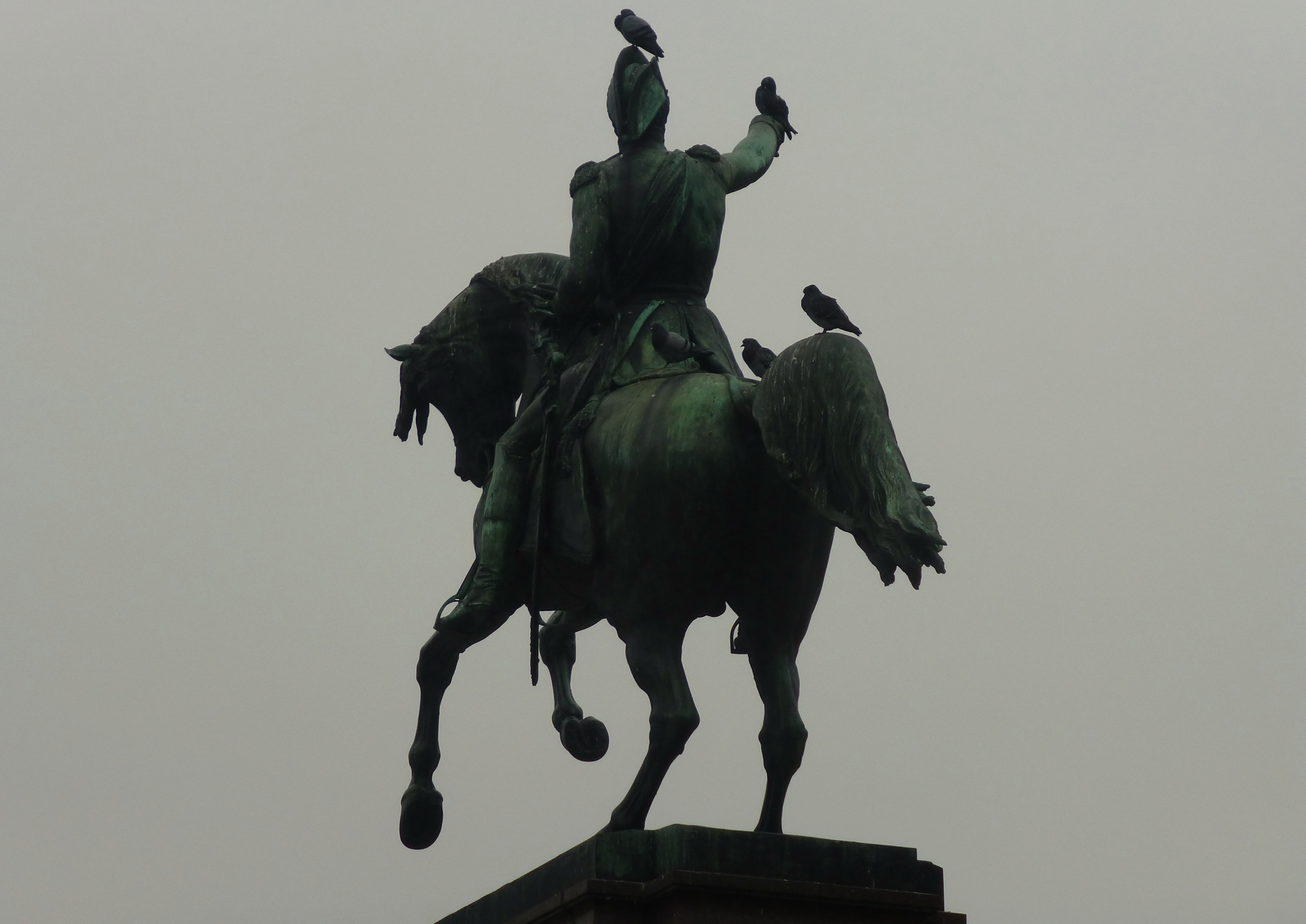 Monumento al General San Martín y a los Ejércitos de la Independencia, Plaza San Martín, Buenos Aires.